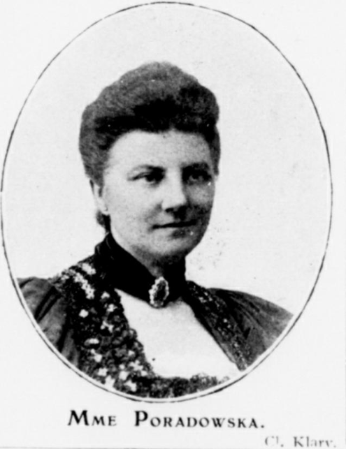 Portrait